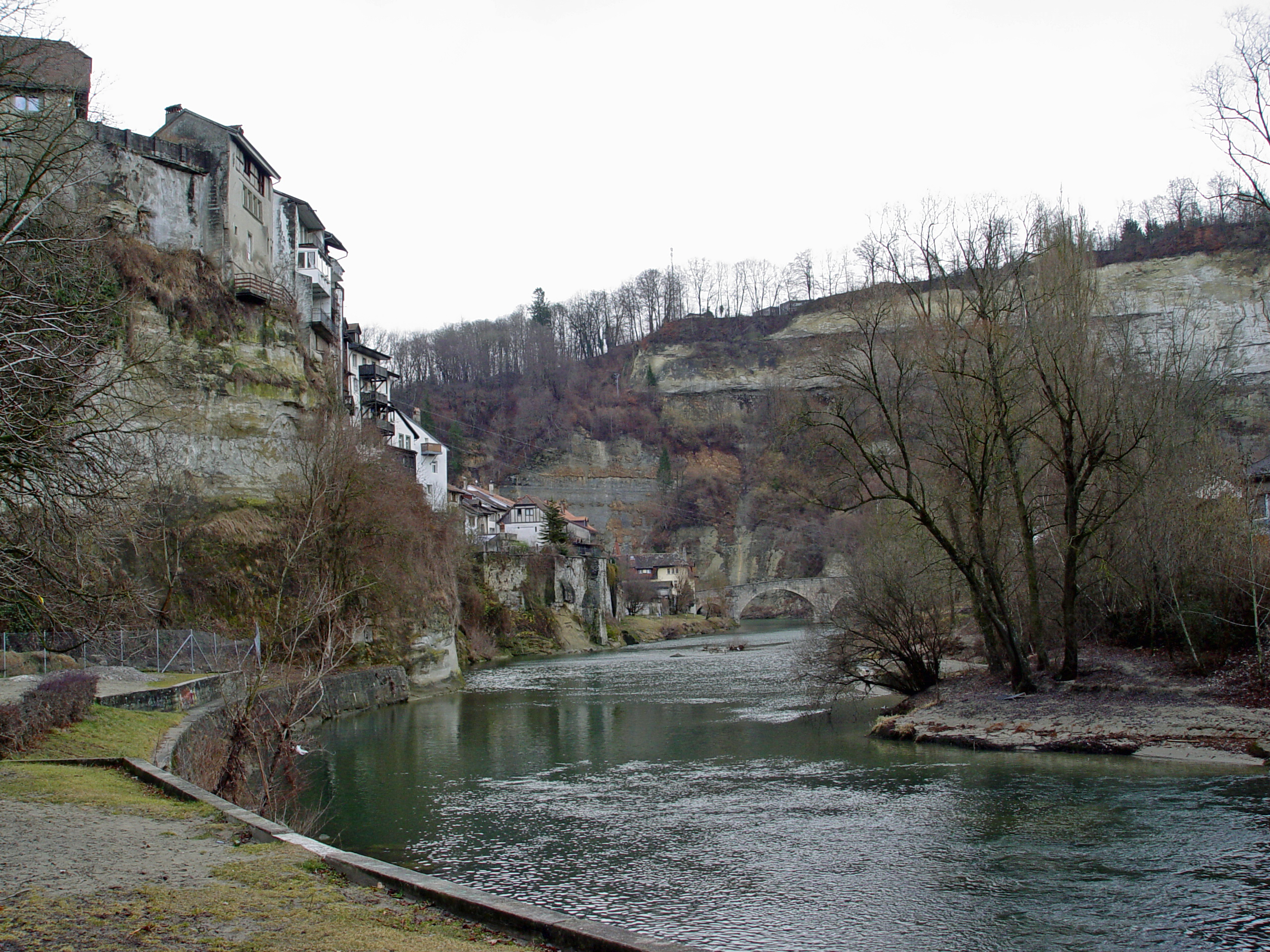 Fluss Saane umgeben von der Altstadt Fribourg